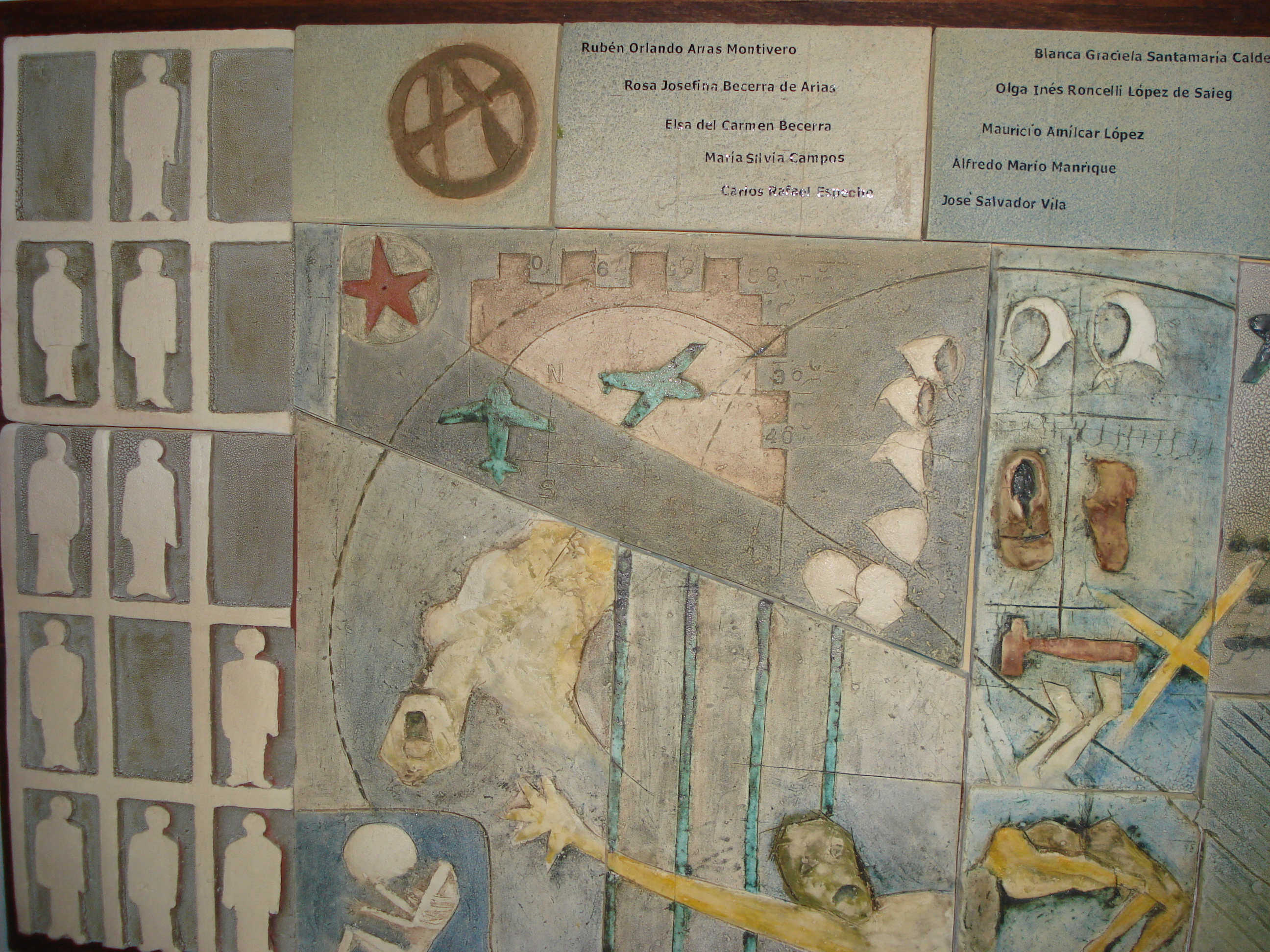 Mural sobre la desaparición forzosa de persona durante la dictadura militar ocurrida en Argentina entre 1976 y 1983